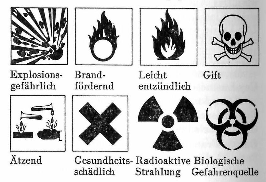 chem. Gefahrensymbole, publiziert 1973